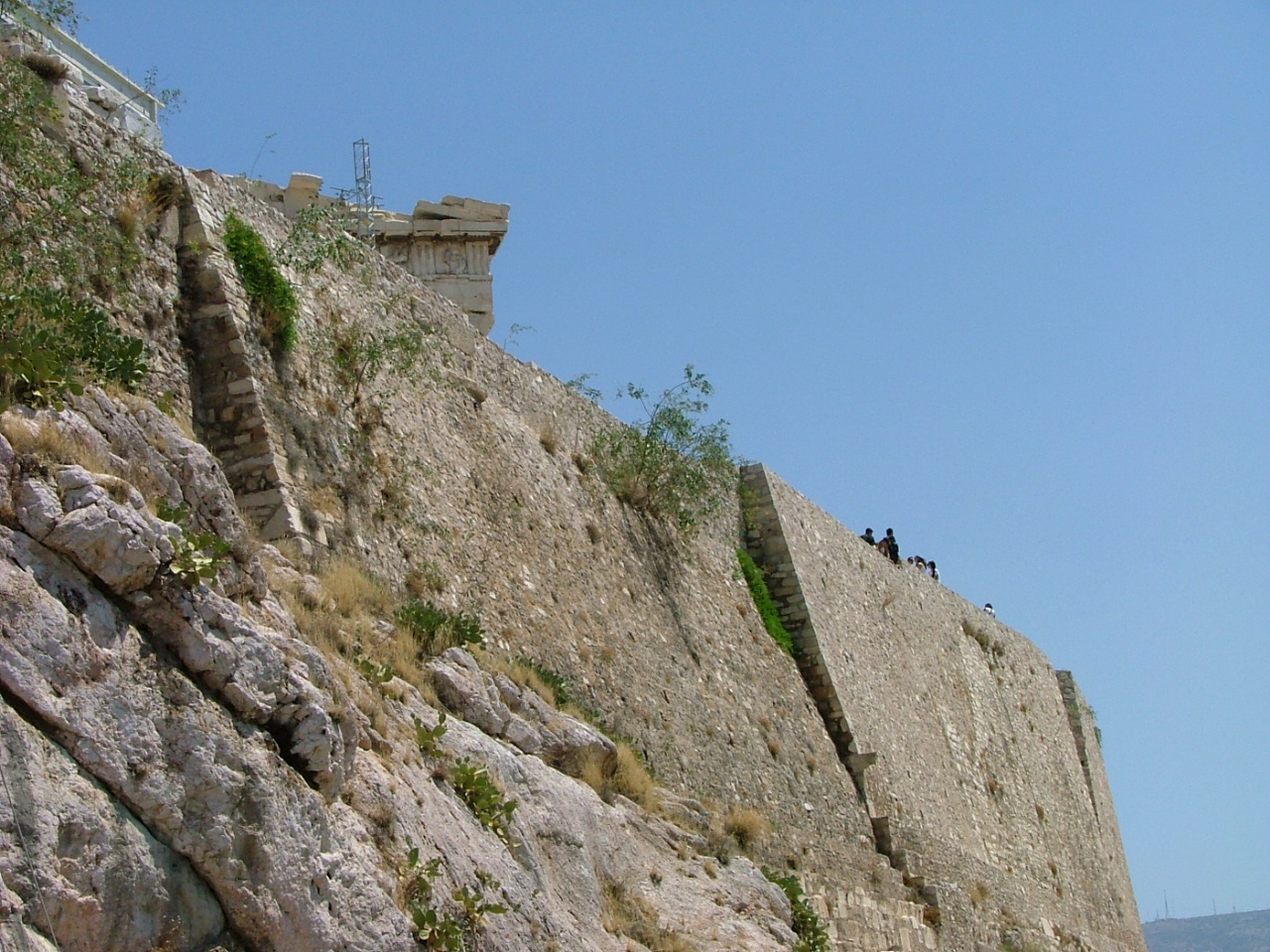 Muro de la Acrópolis de Atenas, con el Partenón asomando.